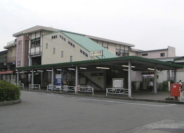 2005年6月12日に投稿者が西八王子駅にて撮影しました。